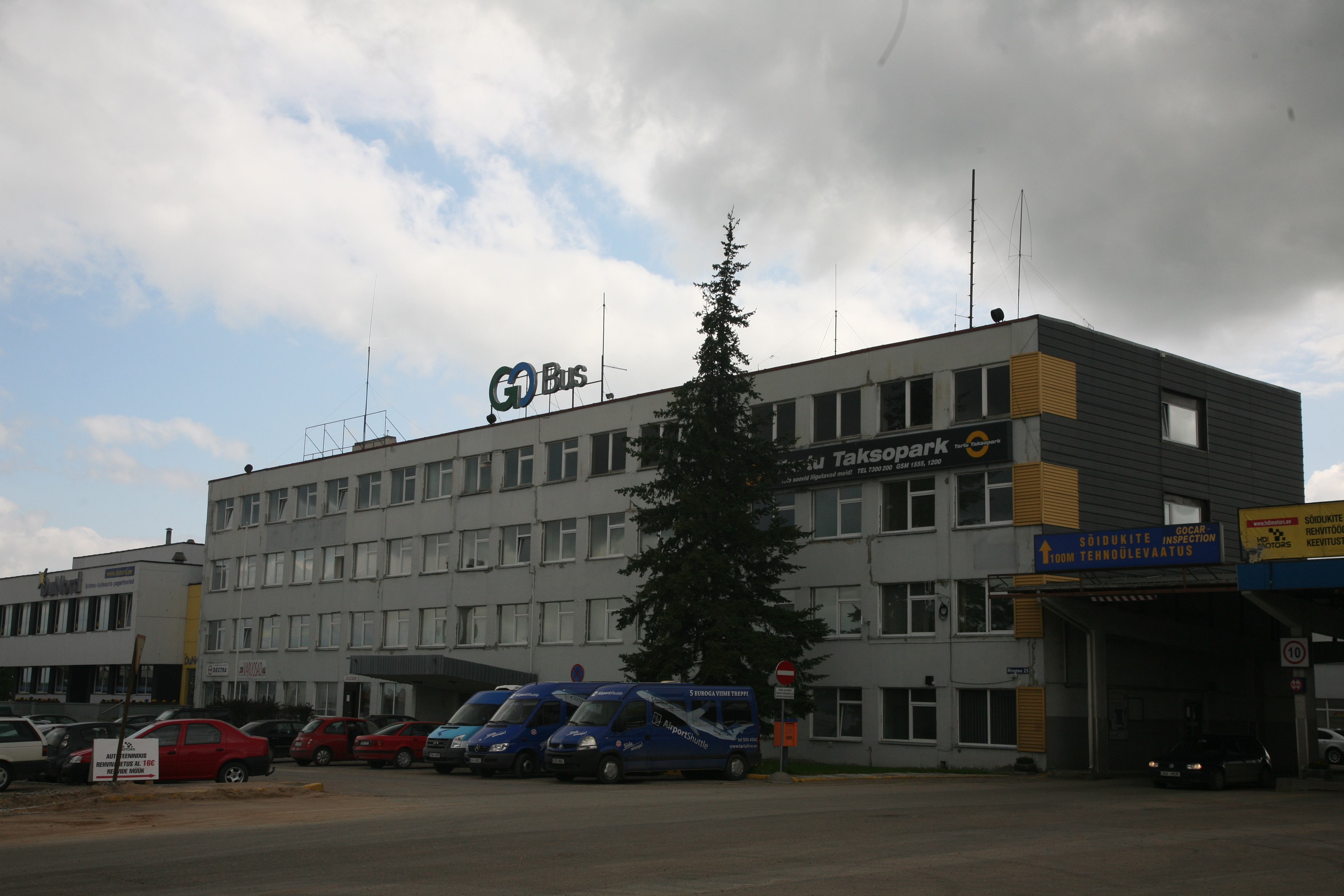 GO Busi kontorihoone Tartus Ringtee tänaval.